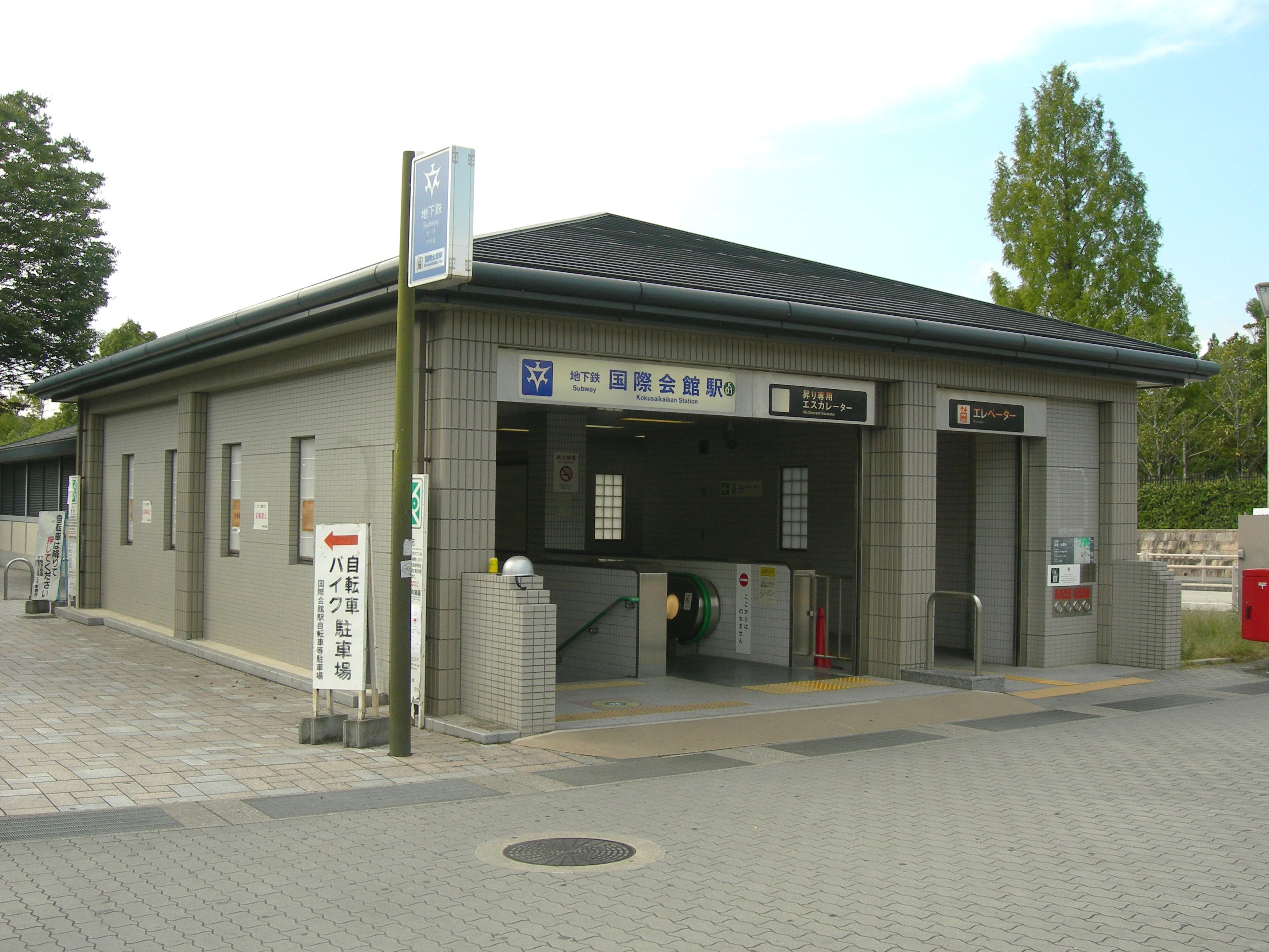 京都市営地下鉄烏丸線国際会館駅3番出口